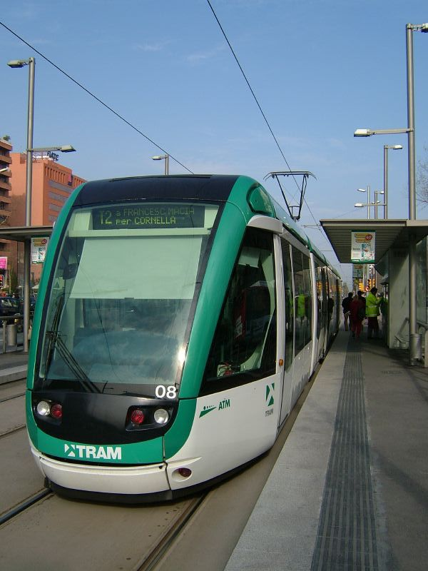 Tramway T2 à Barcelone